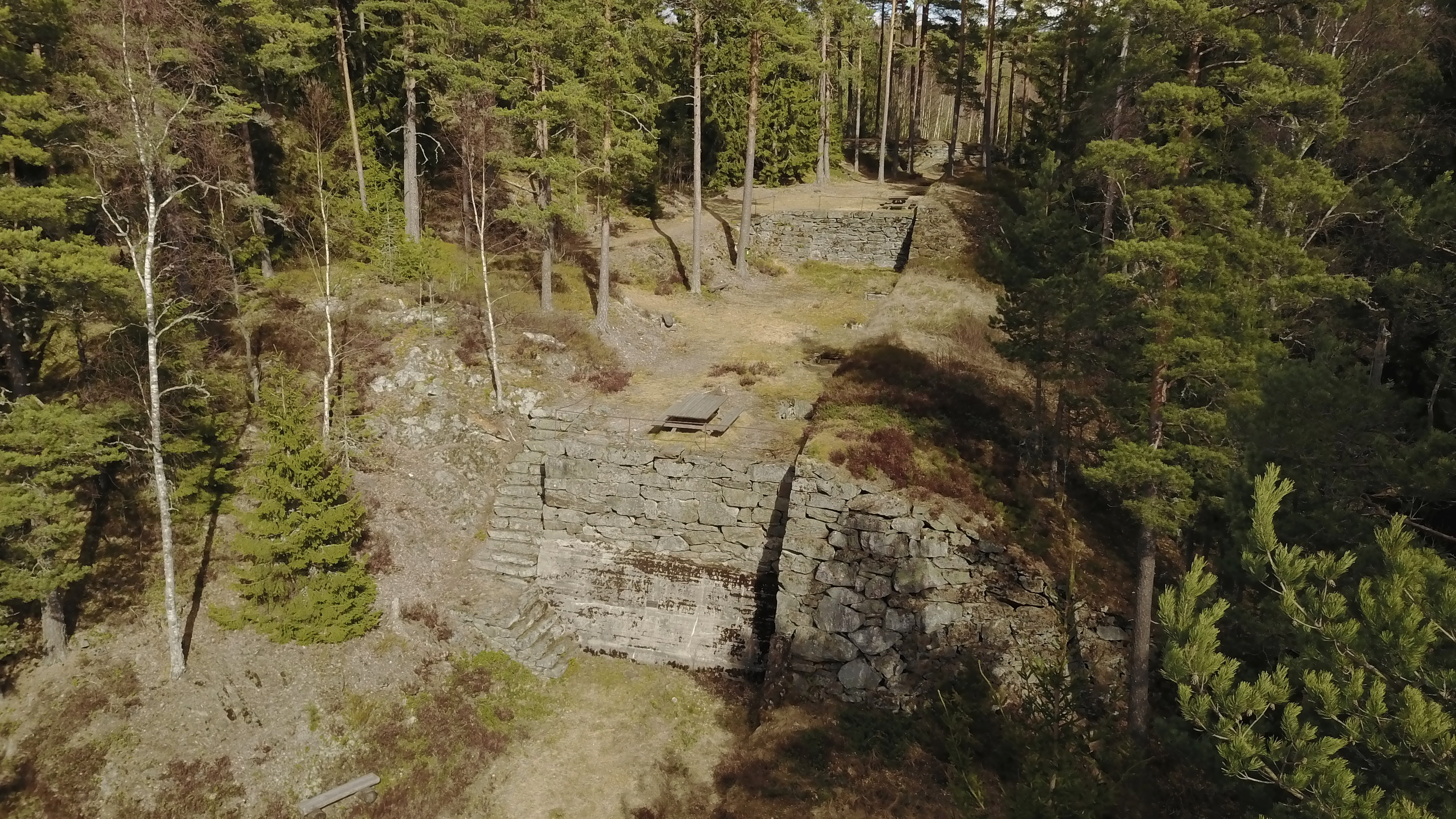 Batteriområdet fra sør-vest